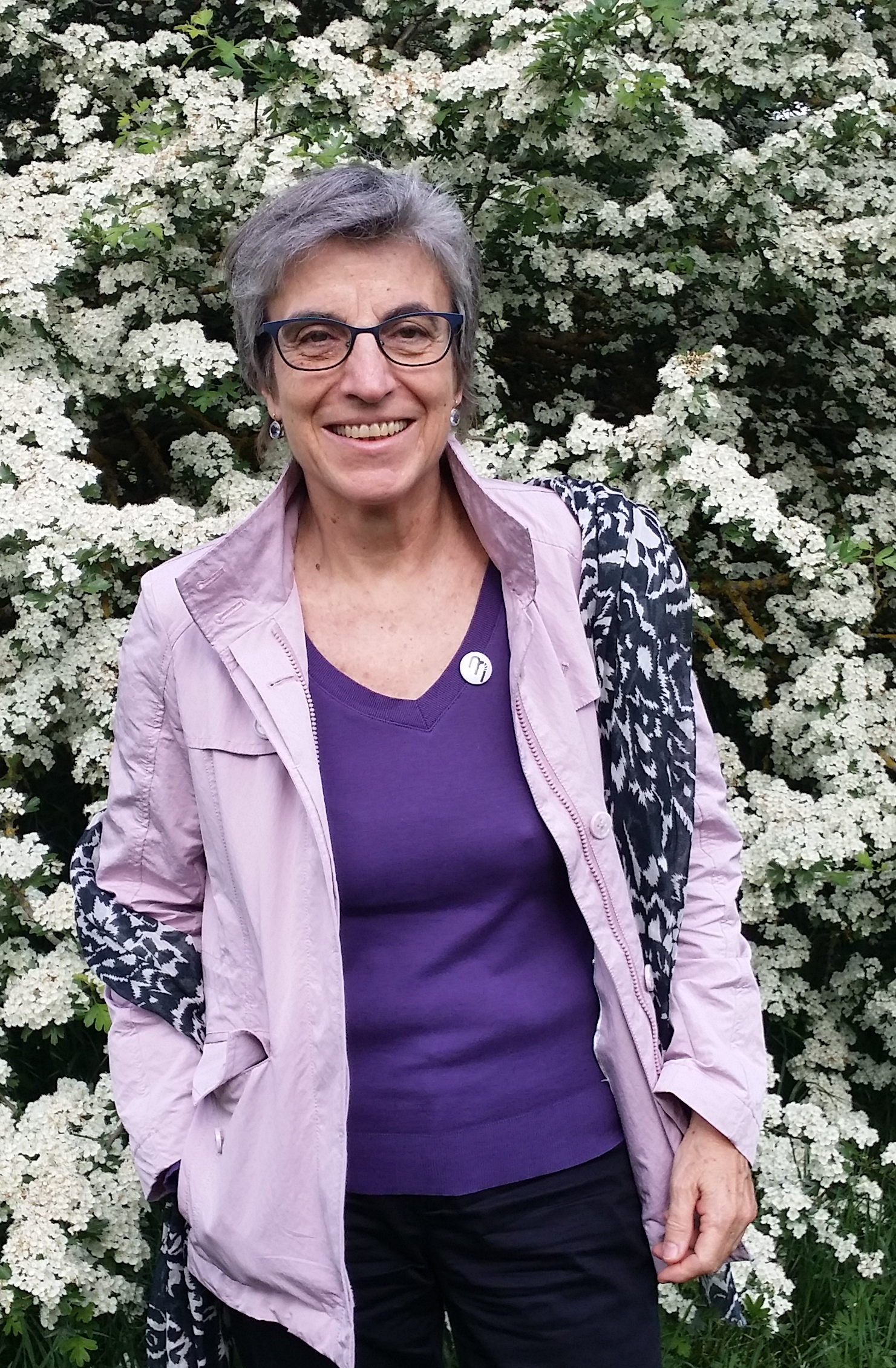 escritora feminista y profesora universitaria española